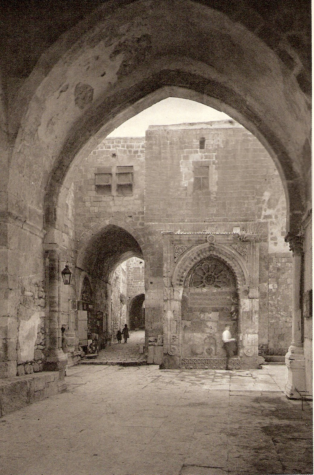 מבט מתוך he:הר הבית דרך he:שער השלשלת בעיר העתיקה בירושלים, 1925 לערך